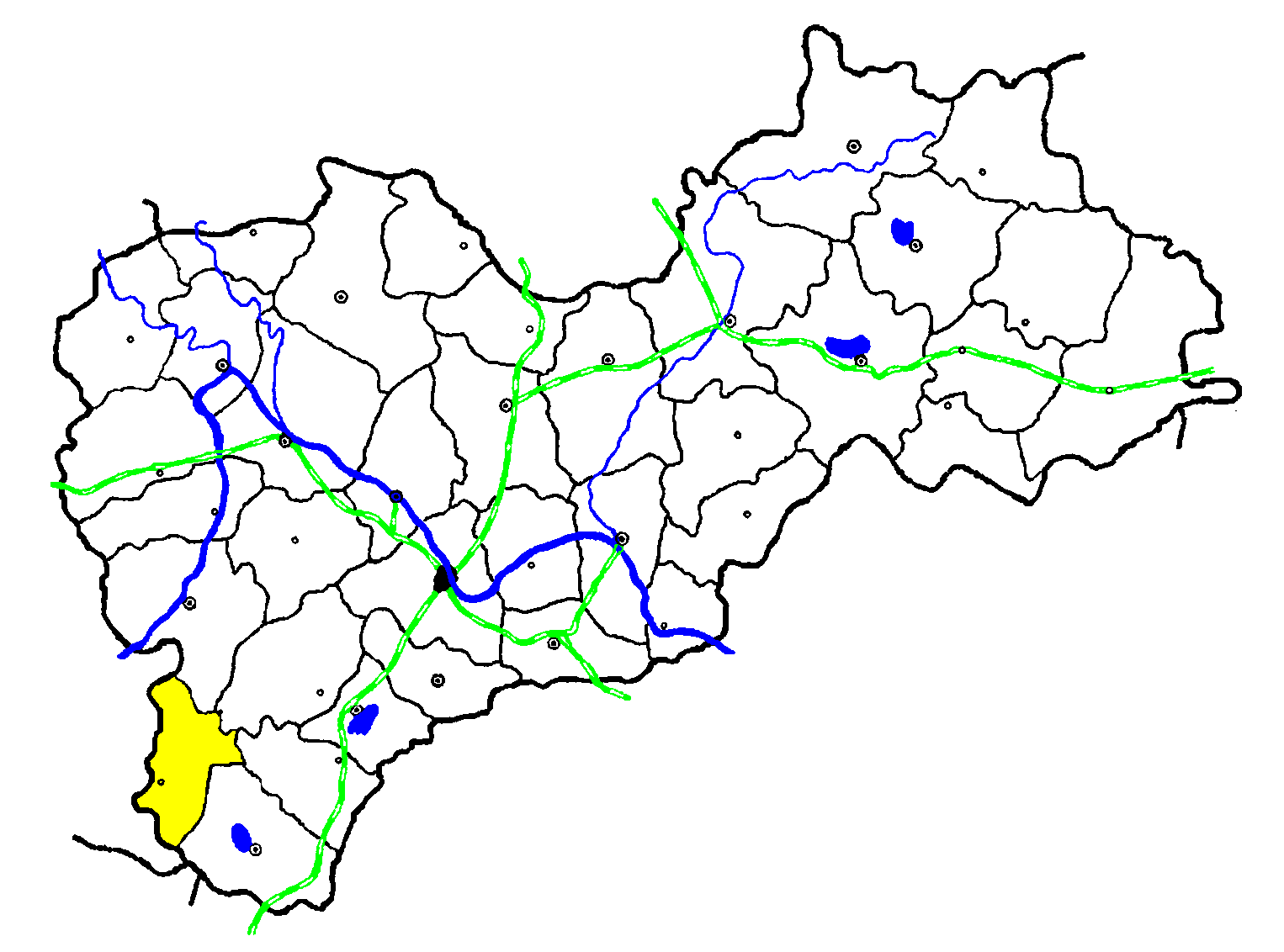 Нагорьевский район на схеме "Ярославская область в 1940 году". Указаны границы и центры районов, железные дороги и основные водные объекты. Первоисточники: Ярославская область в годы Великой Отечественной войны. Научно-популярное справочное издание / Управление по делам архивов Правительства Ярославской области, Государственный архив Ярославской области; сост. Г. Казаринова, О. Кузнецова. — Ярославль: Индиго, 2010. — 400 с. — 1000 экз. — ISBN 978-5-91722-028-4. Рязанцев Н. П., Салова Ю. Г. История Ярославского края (1930—2005 гг.): учебное пособие для учащихся средних общеобразовательных учебных заведений. — Ярославль, Рыбинск: Б/и, Рыбинский дом печати, 2005. — 277 с. — ISBN 5-88697-134-3.